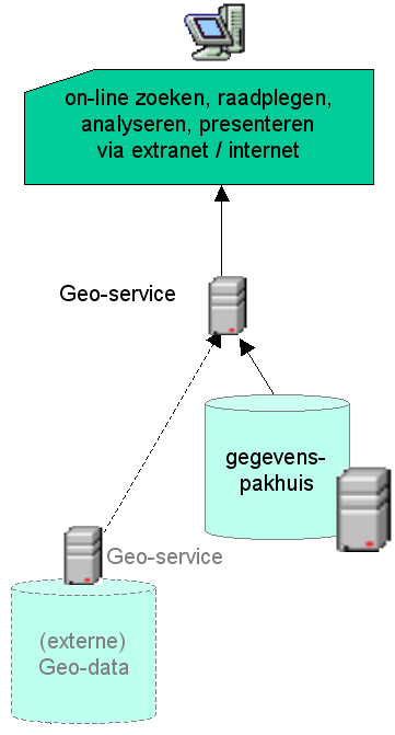 Eigen gemaakte media. Deze GIS-architectuur toont zoals in de praktijk een geo-portaal vaak is, op basis van geo-services. Omdat de data in eigen huis is, en de data maar zelden echt via een service, door de eindgebruiker gekozen, kan worden toegevoegd, is dit feitelijk gezien niet meerdan een goede GIS-viewer gebaseerd op geo-service technieken. Het is feitelijk gezien géén geo-portaal.